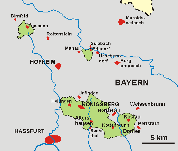 Karte der Exklave Königsberg des Herzogtum Sachsen-Coburg 1826-1918